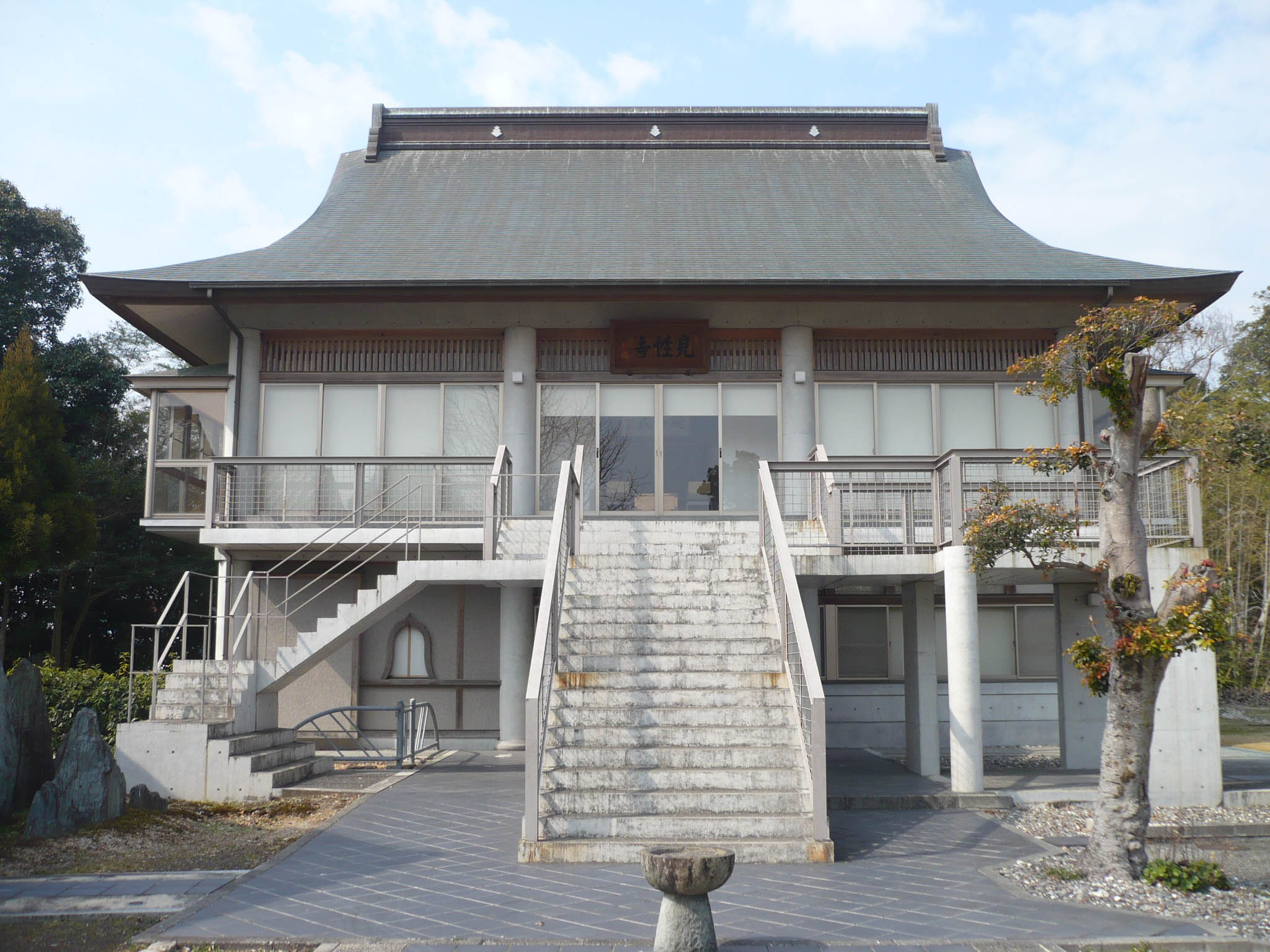 見性寺本堂